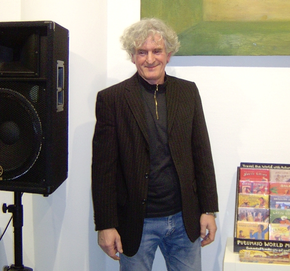 Der Bildhauer und Maler Rolf Biebl während einer Ausstellungseröffnung in Berlin-Mitte, Januar 2008